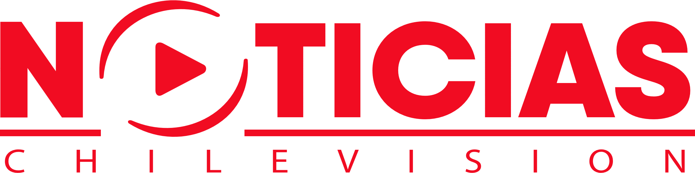 Logotipo del noticiero Chilevisión noticias